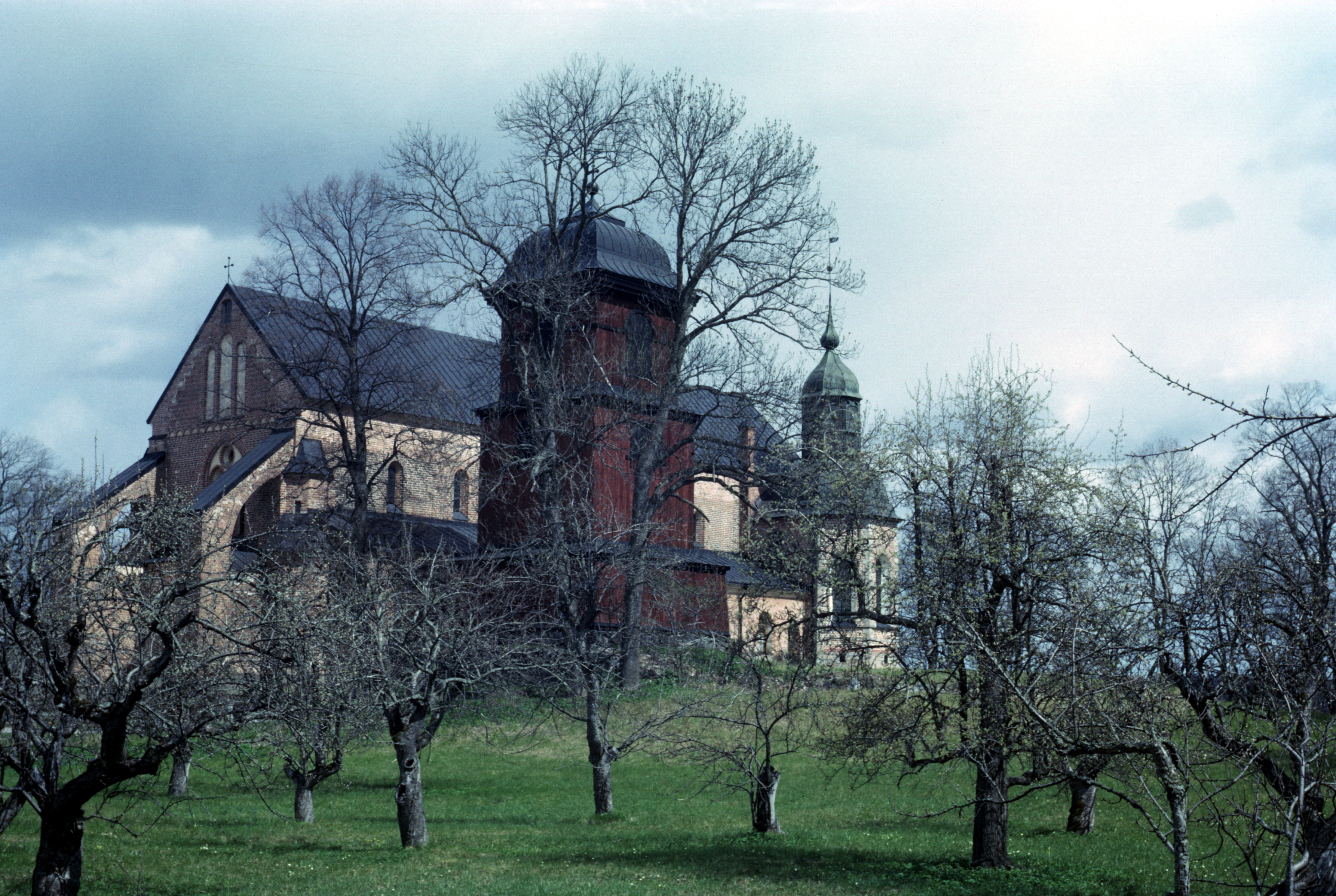 sigtuna kia